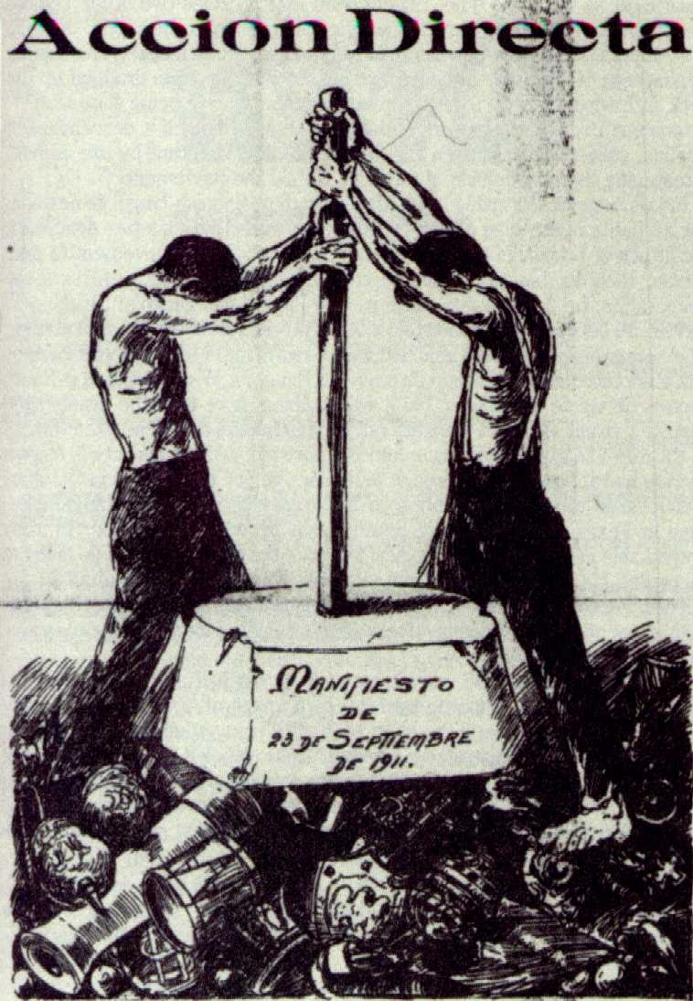 Grabado de Nicolás Reveles publicado en la portada del periódico Regeneración No. 208, editado por los hermanos Flores Magón. Una versión más detallada de la imagen puede encontrarse en Regeneración Tomo IV, No. 208. AE-RFM.